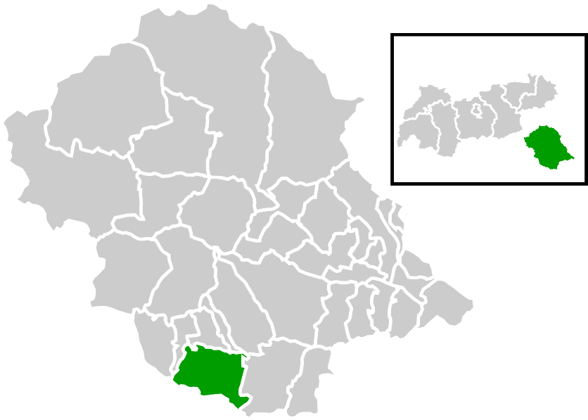 Lage der Gemeinde innerhalb des Bezirks Lienz